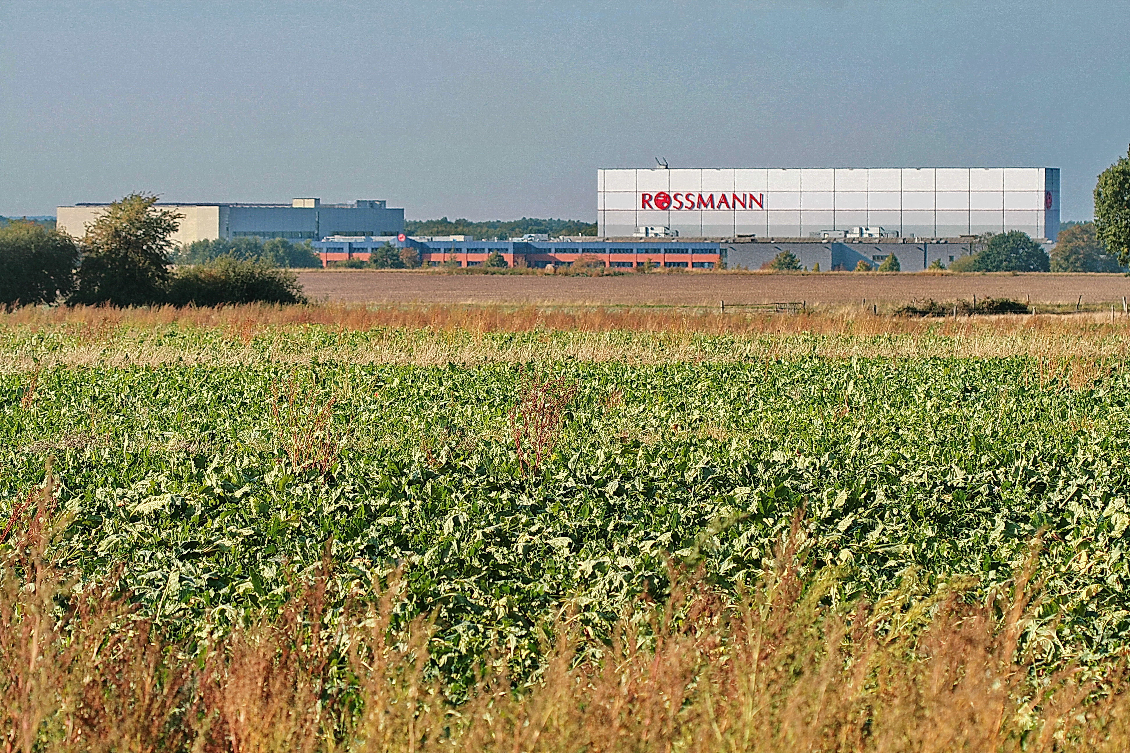 Rossmann-Zentrale in Großburgwedel (Burgwedel), Niedersachsen, Deutschland